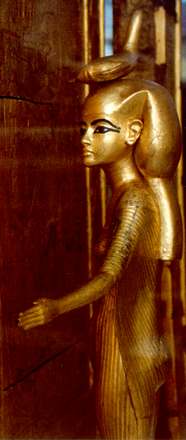 Statue "Selket" aus dem Grab TutAnchAmun im Ägyptischen Museum Kairo. Fotografiert 2002 durch user:Snofru